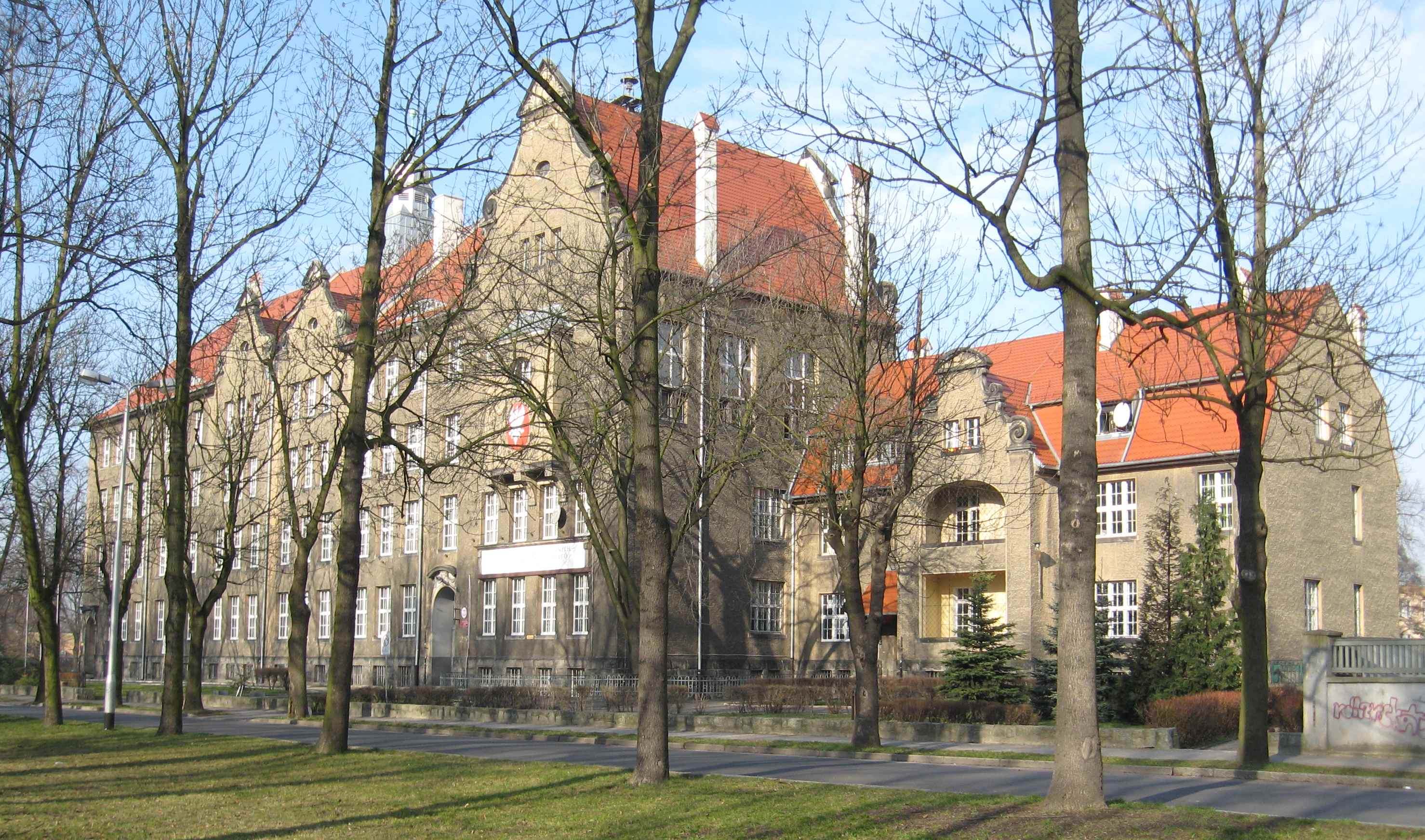 Leszno, ul. Poniatowskiego 2 - Zespoł Szkół Ekonomicznych im. Jana Amosa Komeńskiego.